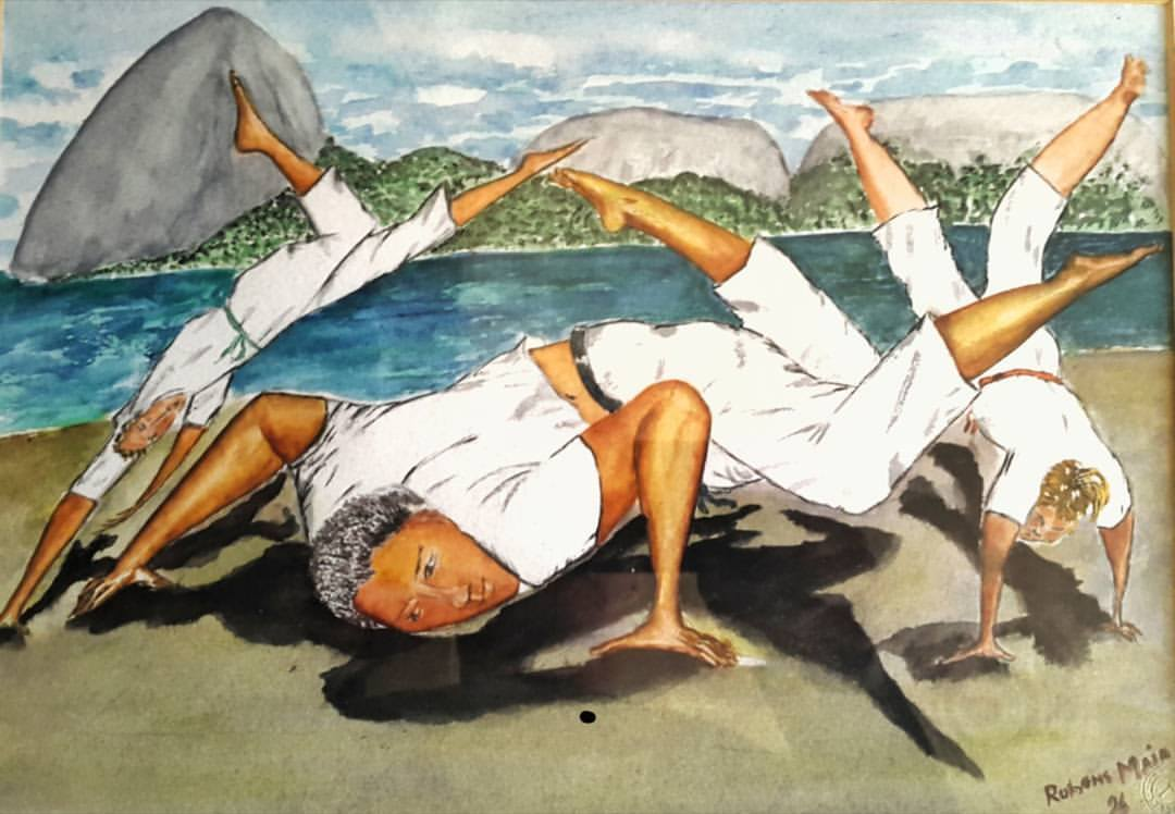 Pintura do artista Rubens Maia, representando uma roda de Capoeira no bairro de Santa Teresa, Rio de Janeiro.